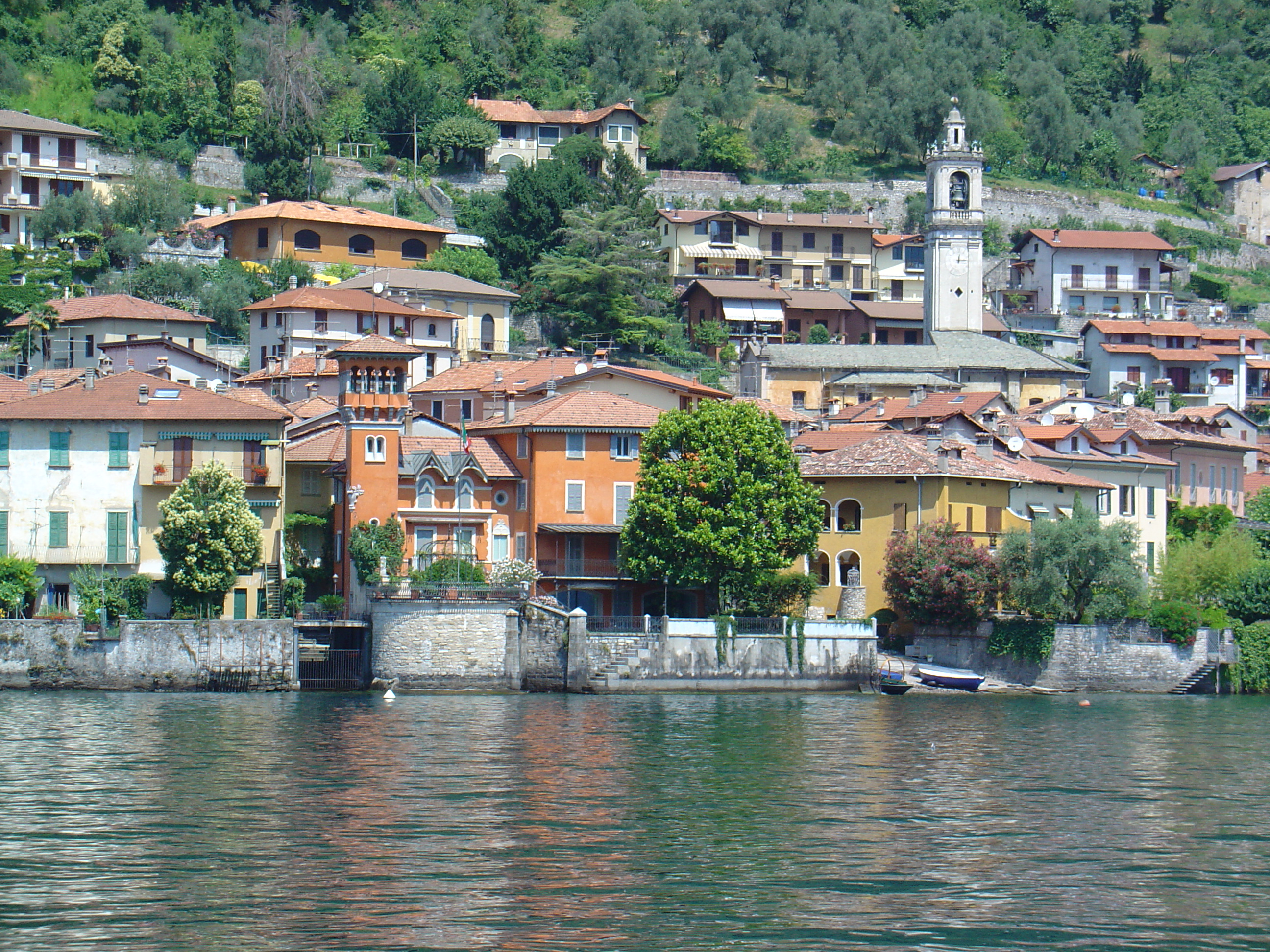 Lac de Côme vers Argenio